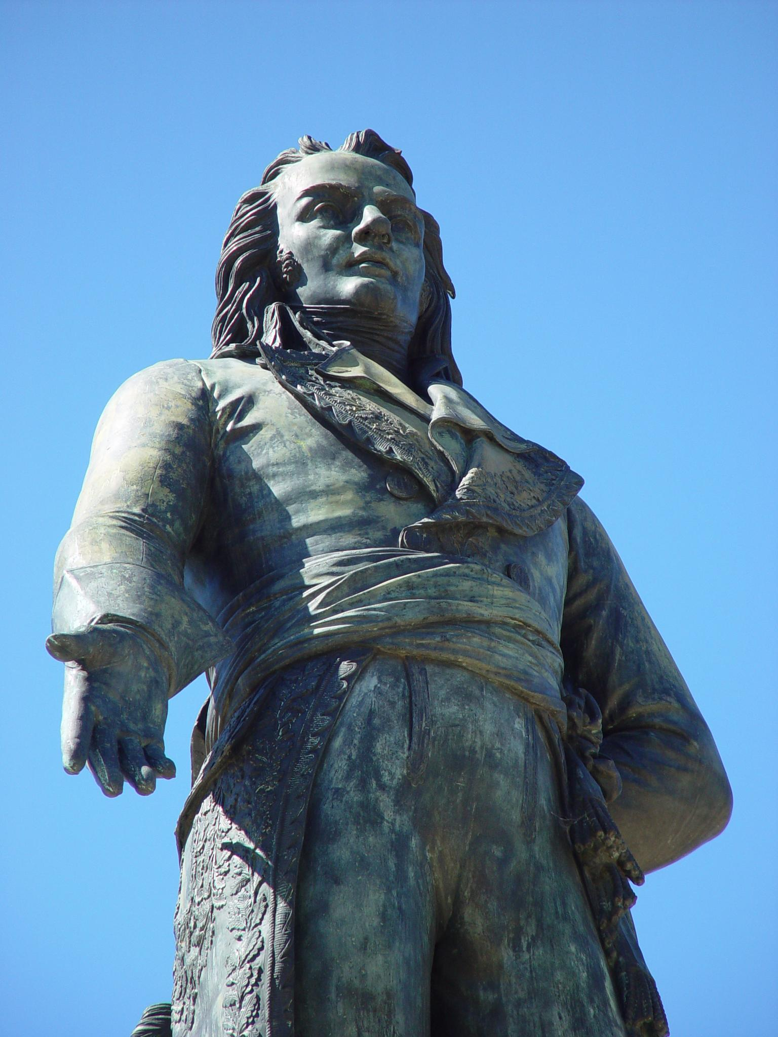 France - Valence - statue de Championnet sur le Champ de Mars par Victor Sappey